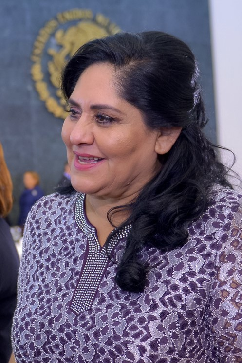 Diva Gastelum Bajo, senadora de México de 2012 a 2018